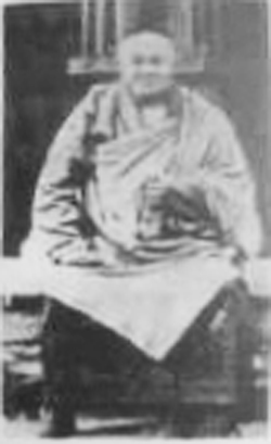 罗卜僧勒布希德特布丹扎拉森，科尔沁右翼前旗葛根庙的第六世诺彦活佛